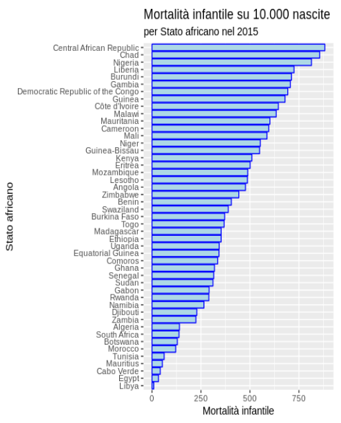 file realizzato con RStudio con dati dal WHO